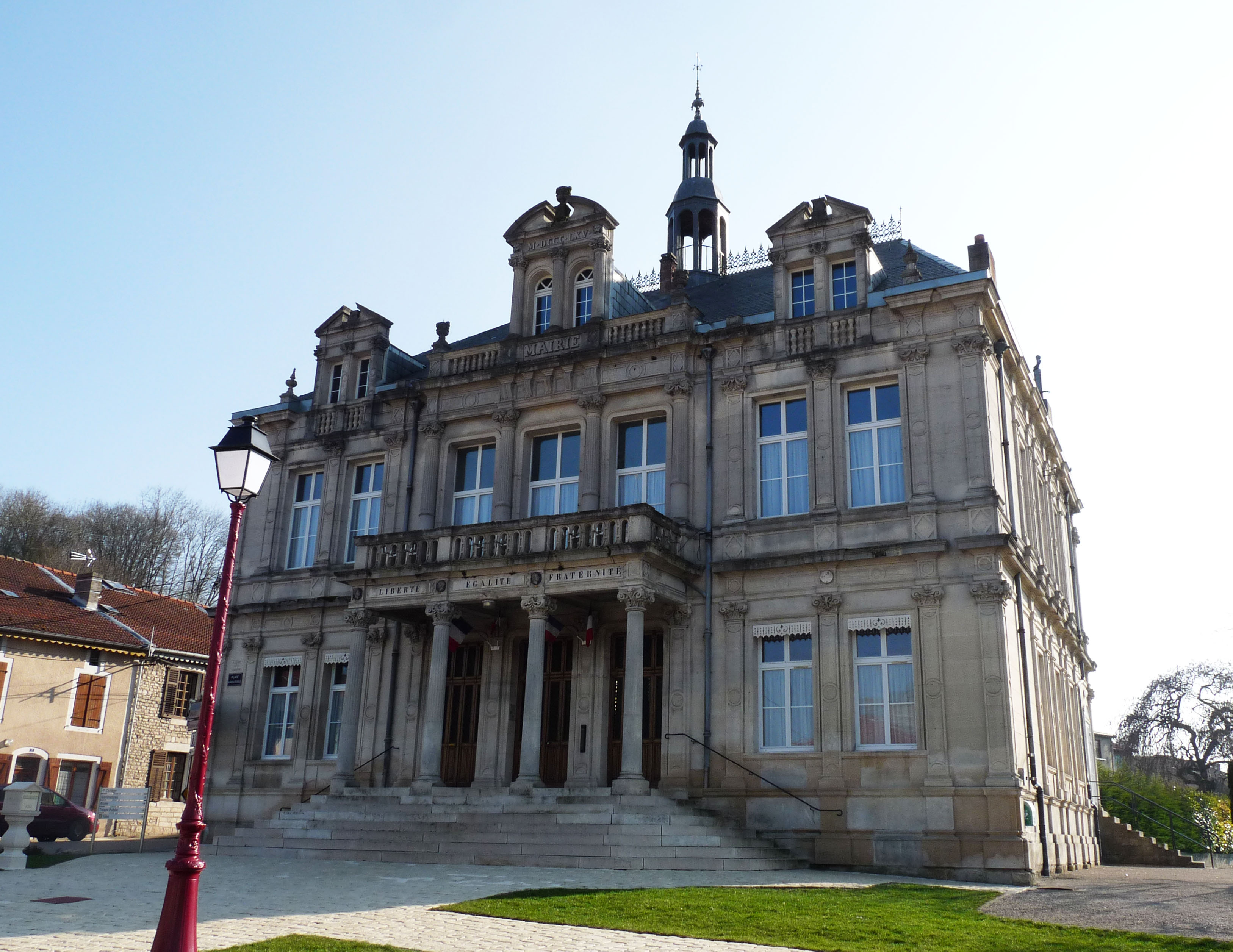 Mairie de Montiers-sur-Saulx (Meuse)